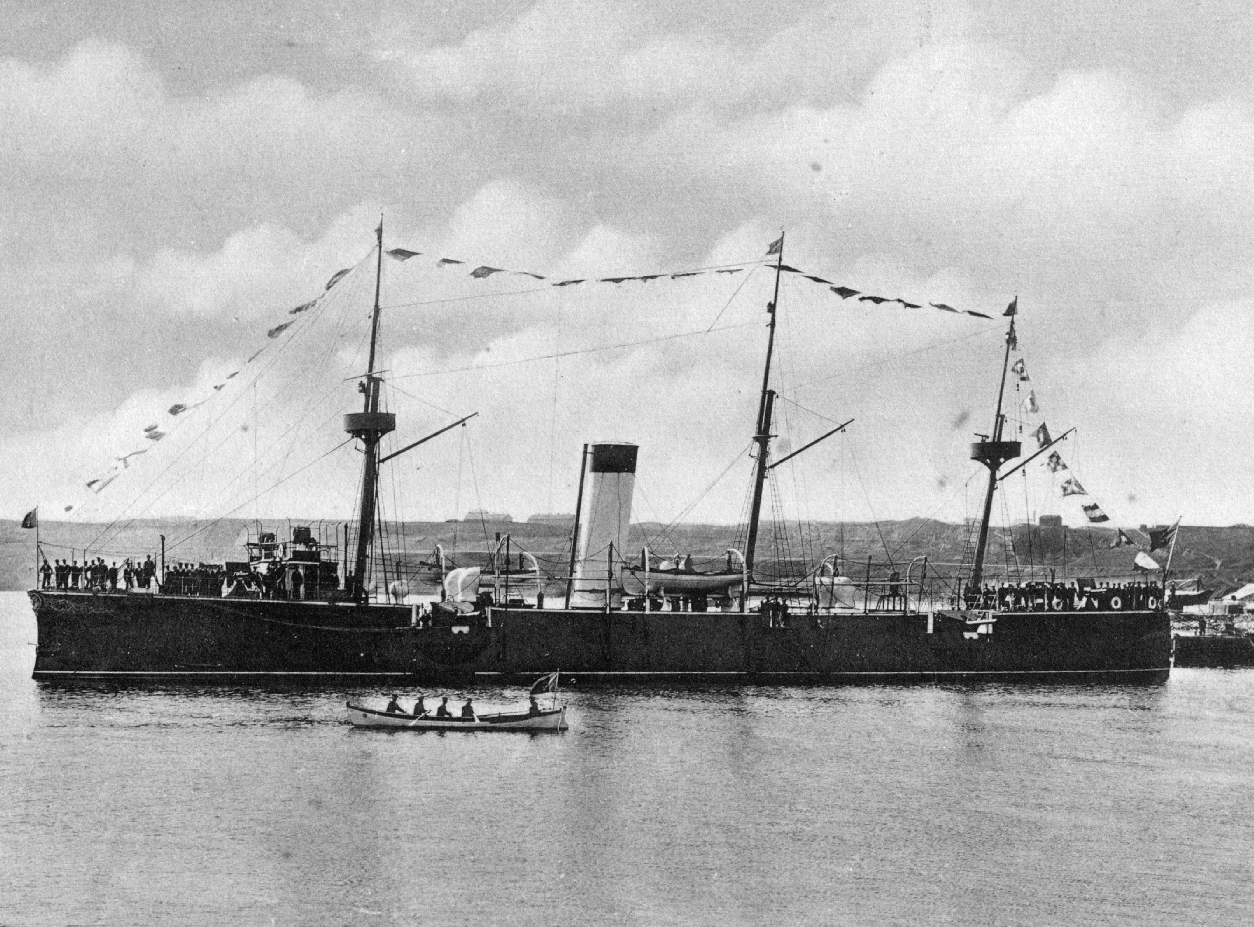 Крейсер ВМС Румынии «Элизабет» (1888-1919).